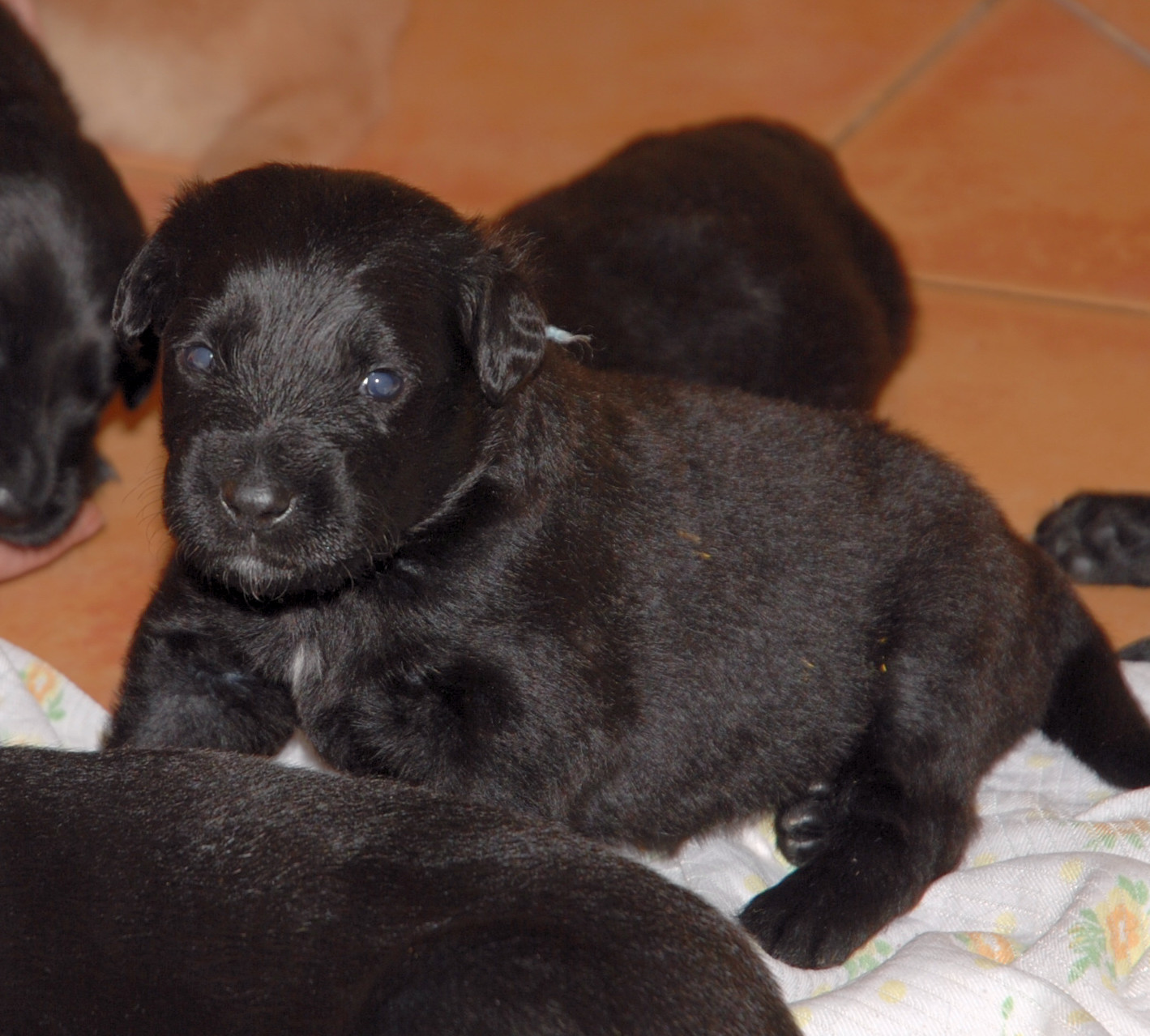 hovawart puppy, 3 weeks old